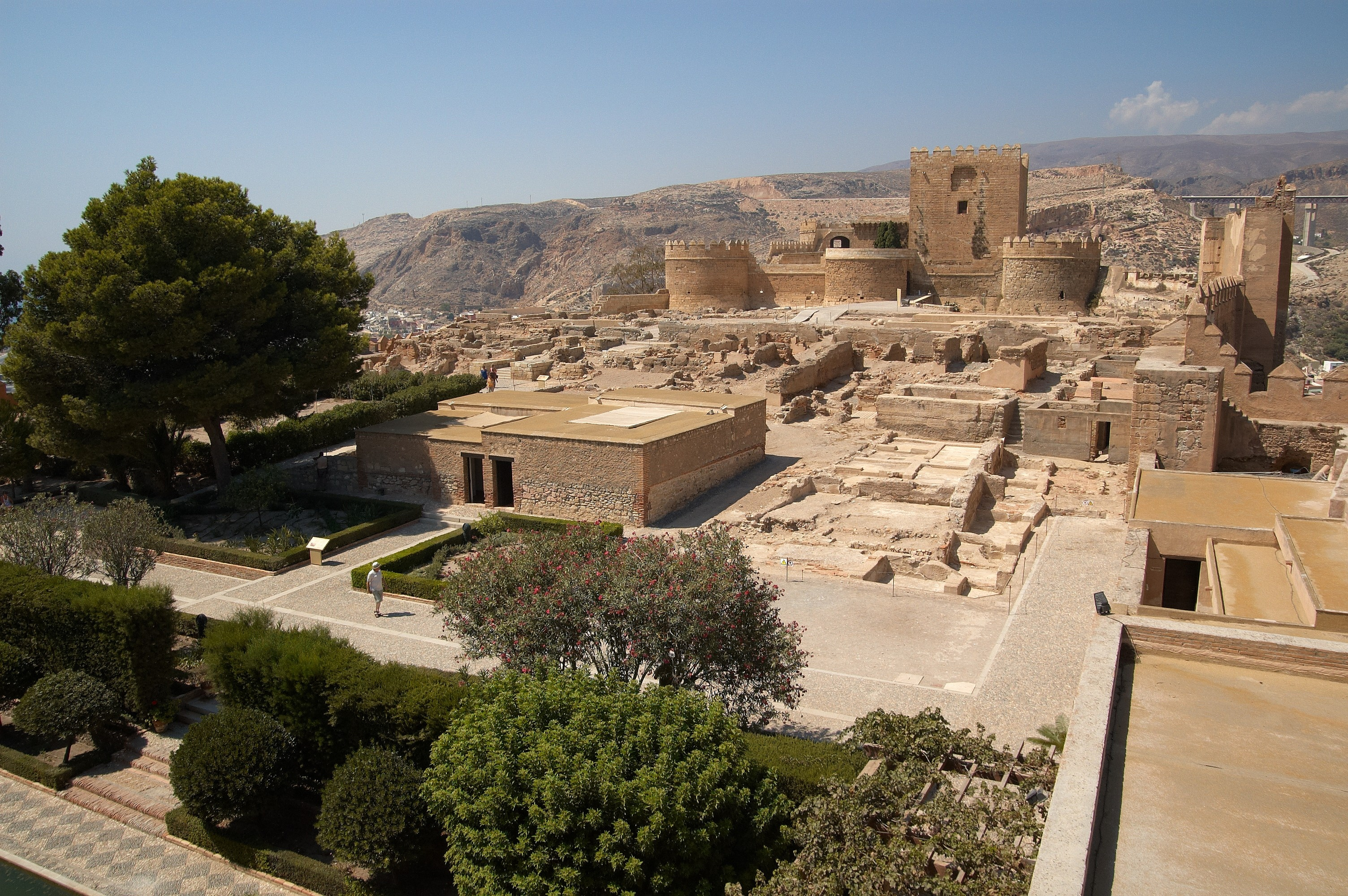 Vista del castillo en el tercer recinto de la Alcazaba de Almería.